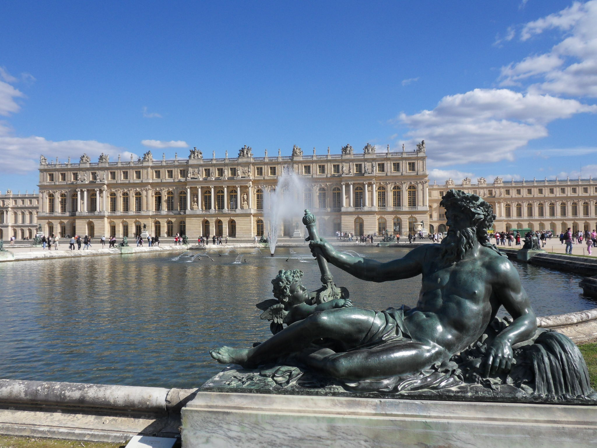 Château de Versailles — Le Parterre d’Eau, bassin sud Le Rhône. Décoration du bassin par une statue couchée figurant un fleuve ou une rivière de France : La Loire et le Loiret, Le Rhône et la Saône, La Seine et la Marne, La Garonne et la Dordogne. Bronze fondu par les frères Keller et placé sur la margelle d'un bassin du Parterre d'Eau des jardins de Versailles, façade ouest du château de Versailles